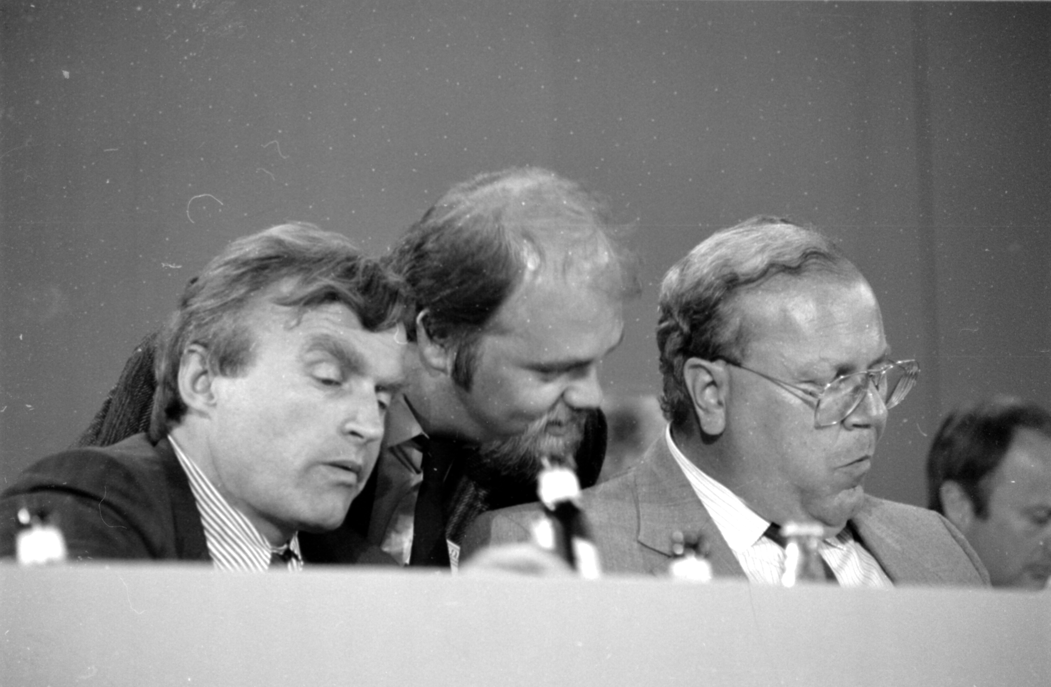 Den außerordentlichen Bundesparteitag Den Bundesparteitag der FDP 1986 hielt die FDP vom 23. bis 25. Mai 1986 in Hannover ab. Es handelte sich um den 37. ordentlichen Bundesparteitag der FDP in der Bundesrepublik Deutschland.